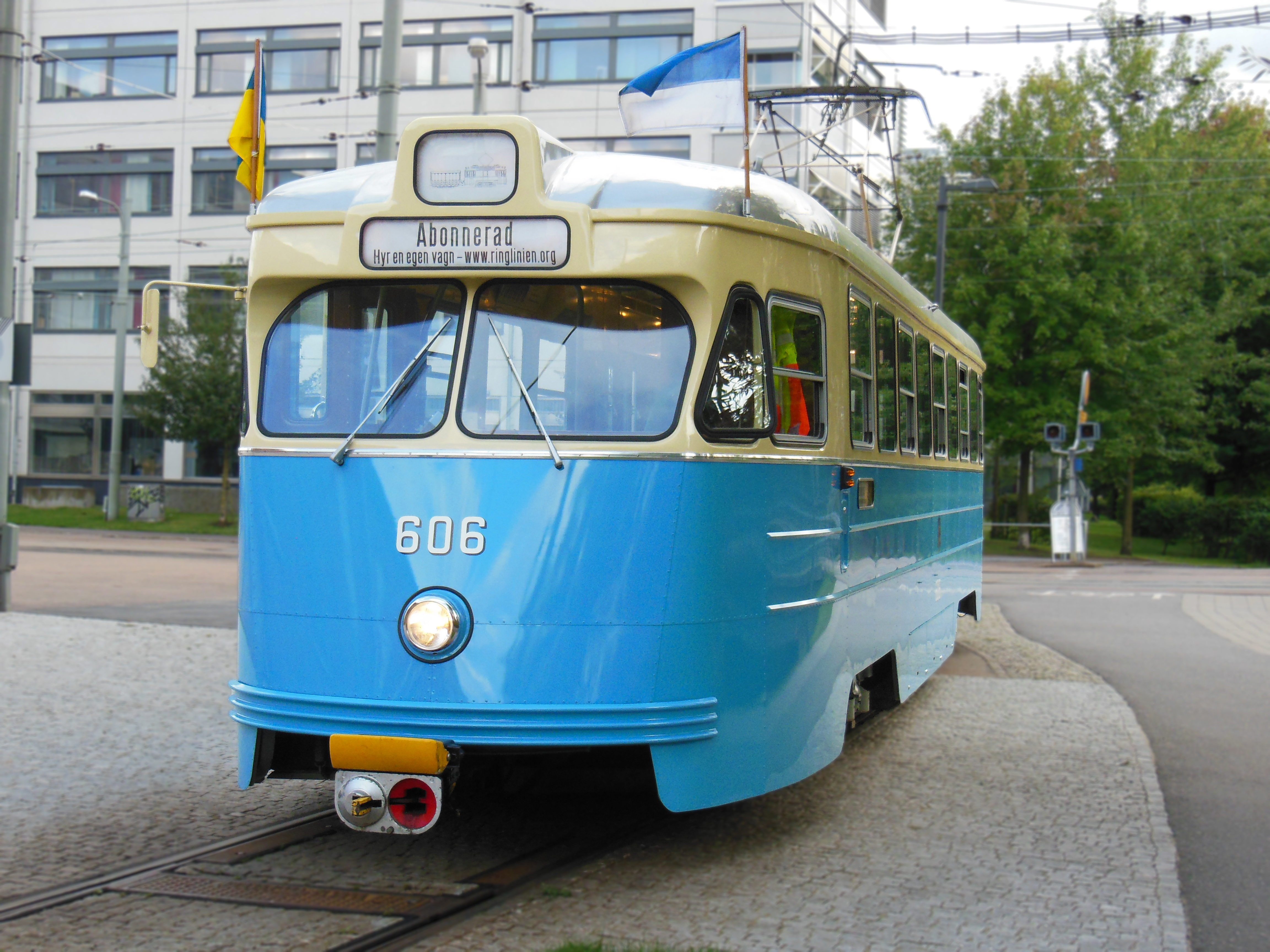 M25-spårvagn nummer 606 parkerad på Åvägen, i Göteborg.